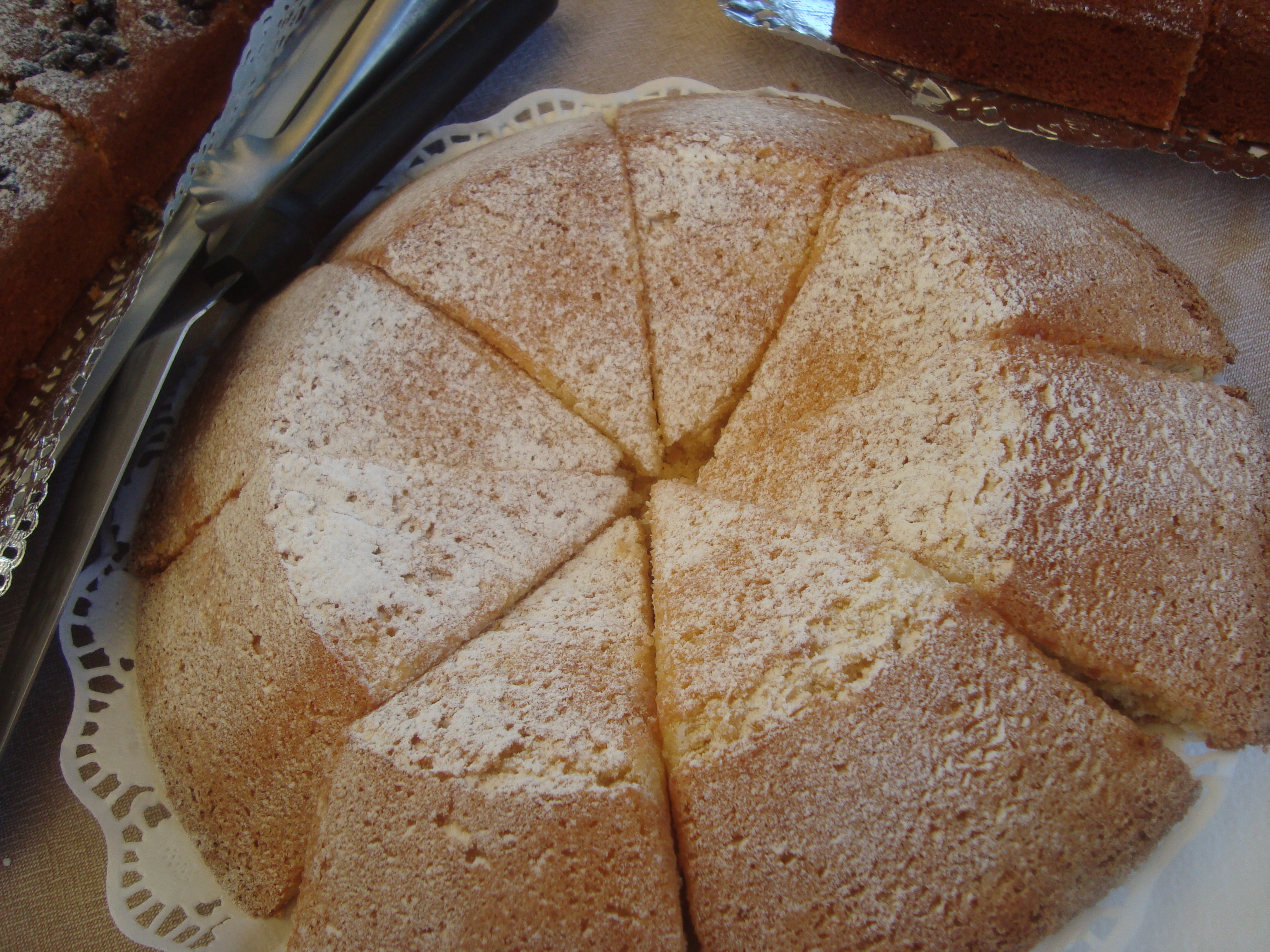 TORTÁ D'AMETLES. INGREDIENTS: 12 ous, 500 g de sucre, 500 g d'ametlla mòlta, farina, sucre mòlt.